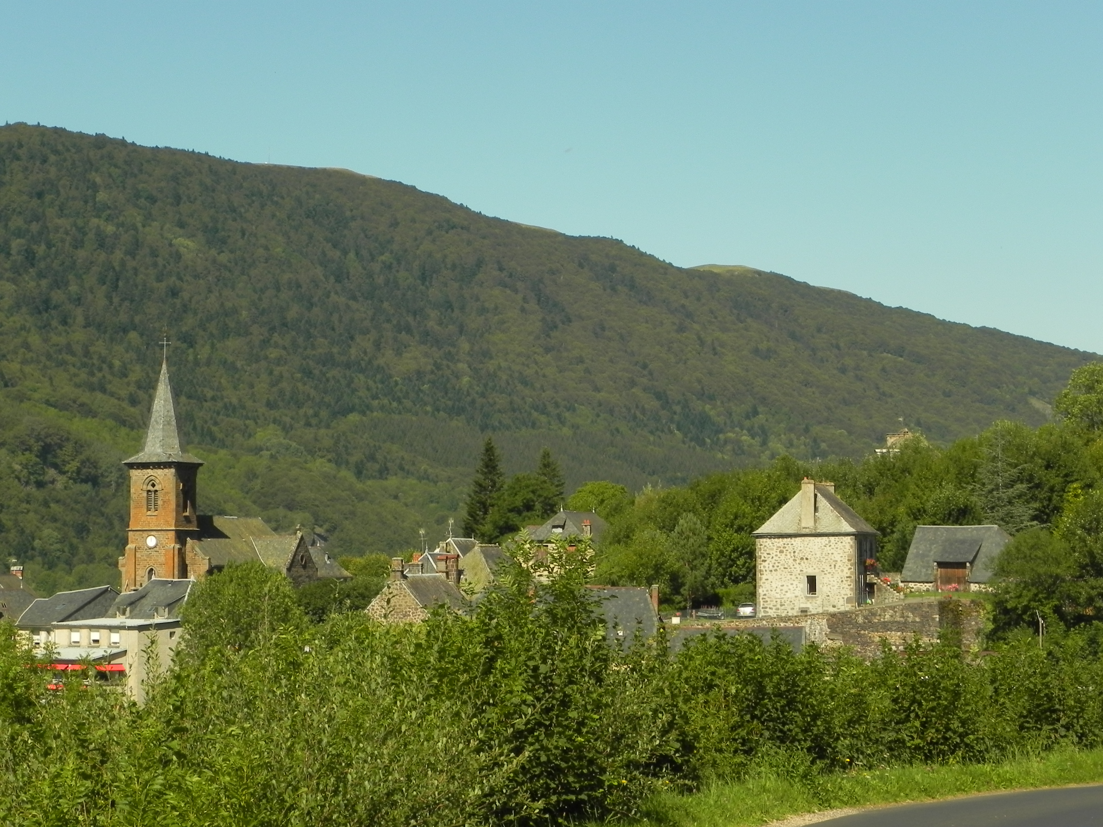 Le Falgoux est situé au pied du Puy-Mary, au cœur du parc des volcans d'Auvergne, dans le département du Cantal.